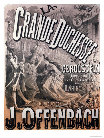 Affiche: La Grande Duchesse de Gerolstein